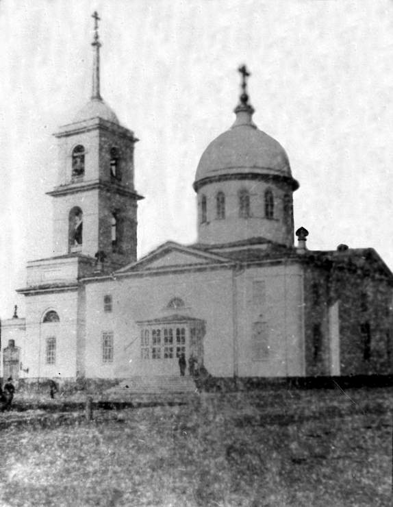 Самара. Вознесенский собор.